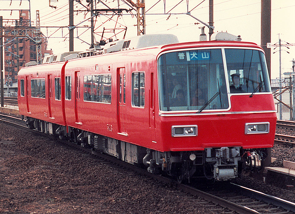 名古屋鉄道 5300系 2両編成